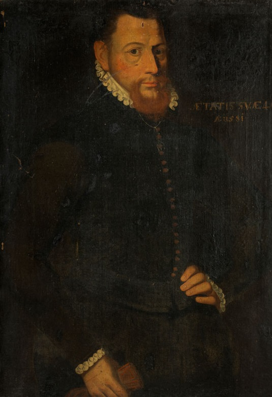 Johan Ripperda, heer van Weldam, lid Verbond der Edelen